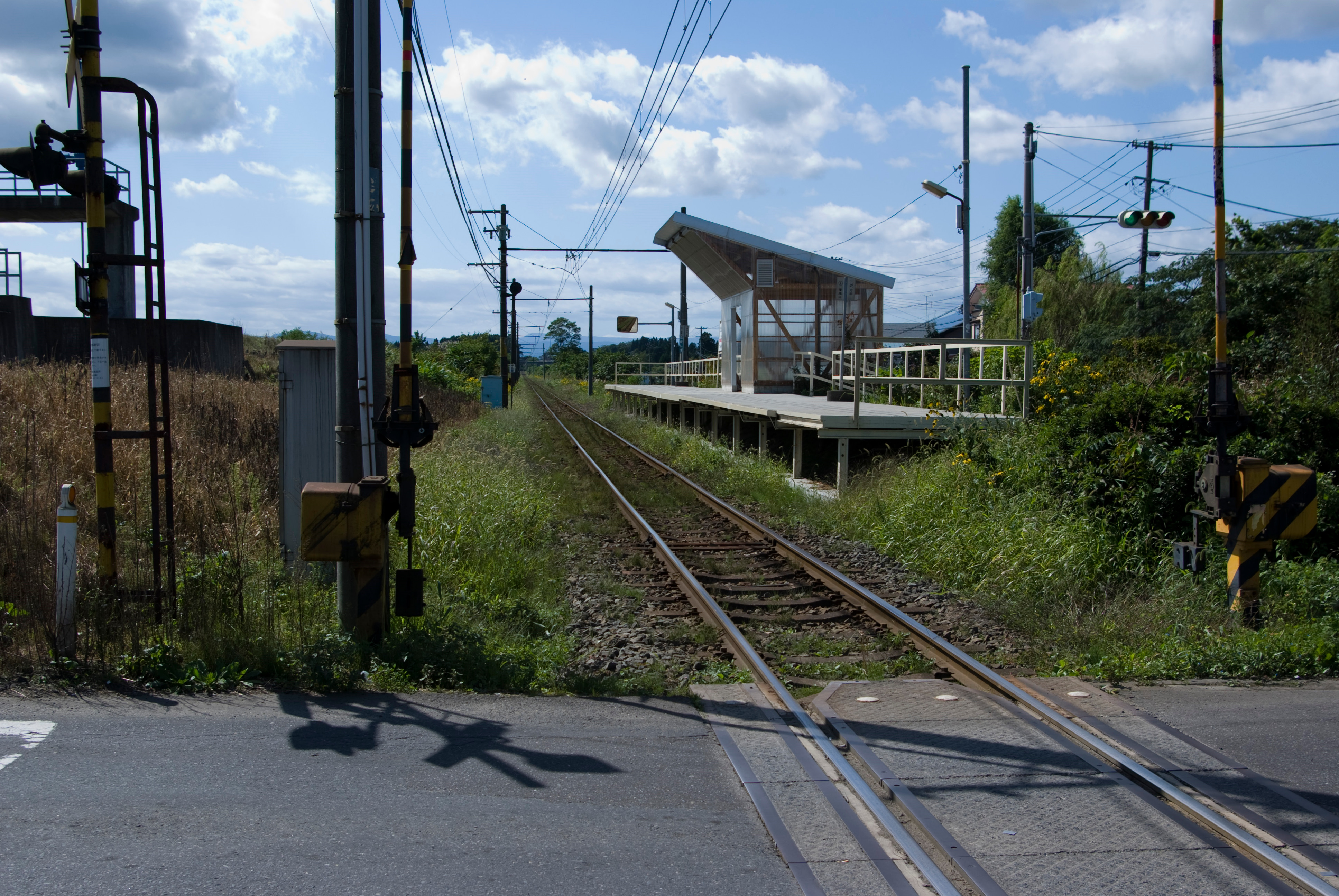 十和田観光電鉄高清水駅